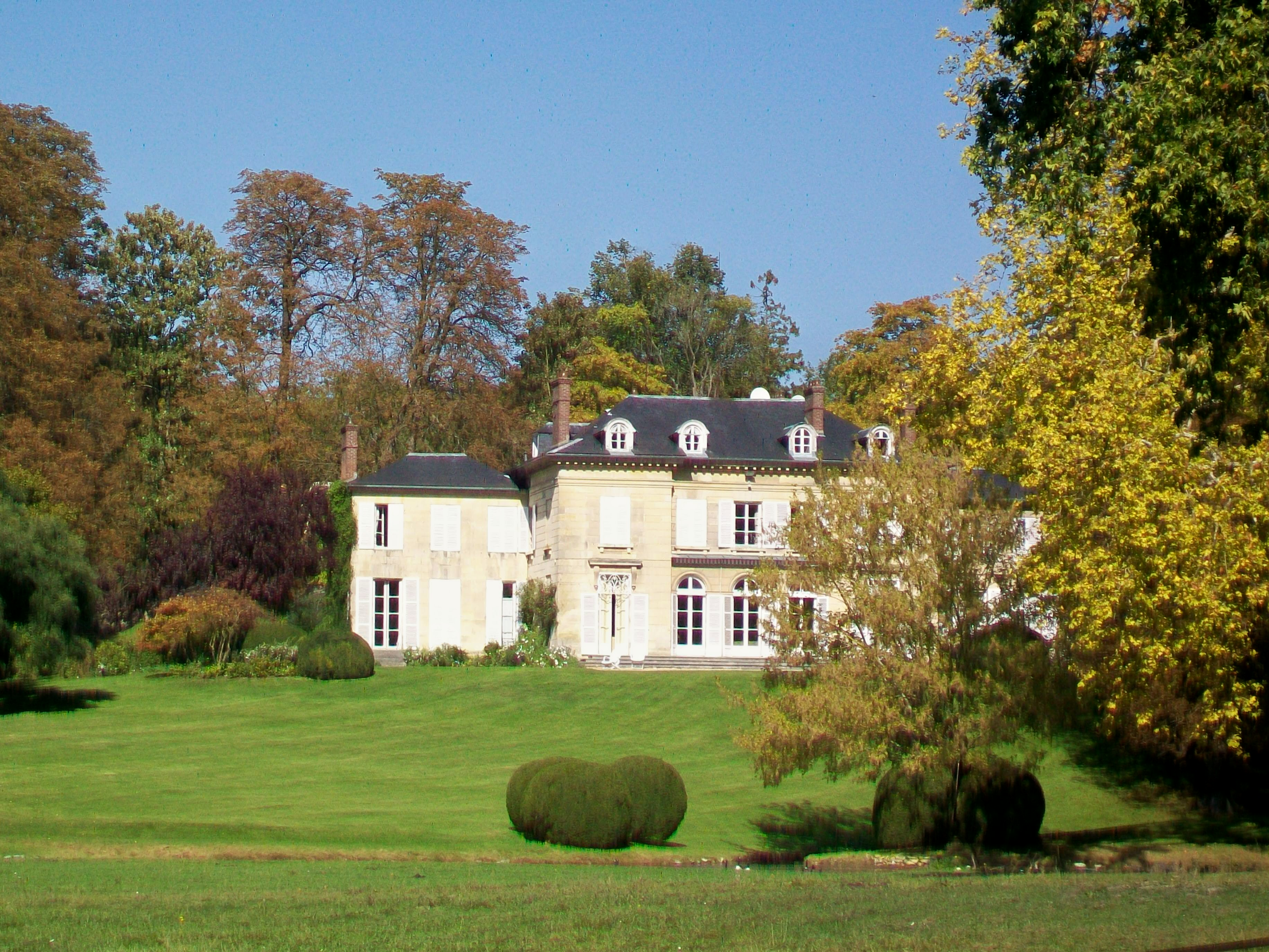 Le château de Saint-Firmin dans le parc de Chantilly, près de la grande cascade ; propriété de l'Institut, il est loué à des particuliers.